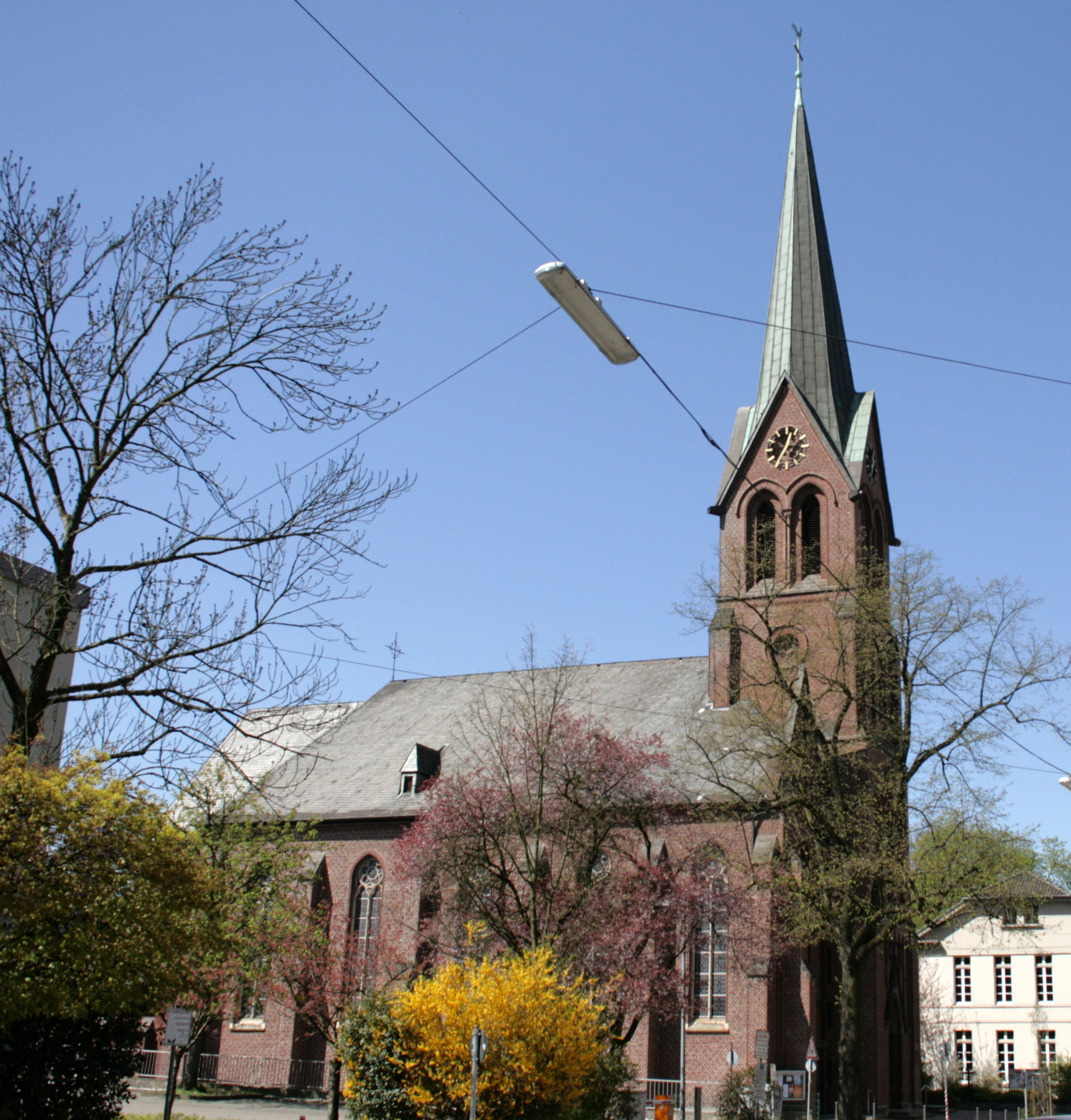 Hattingen, katholische Pfarrkirche St. Peter und Paul